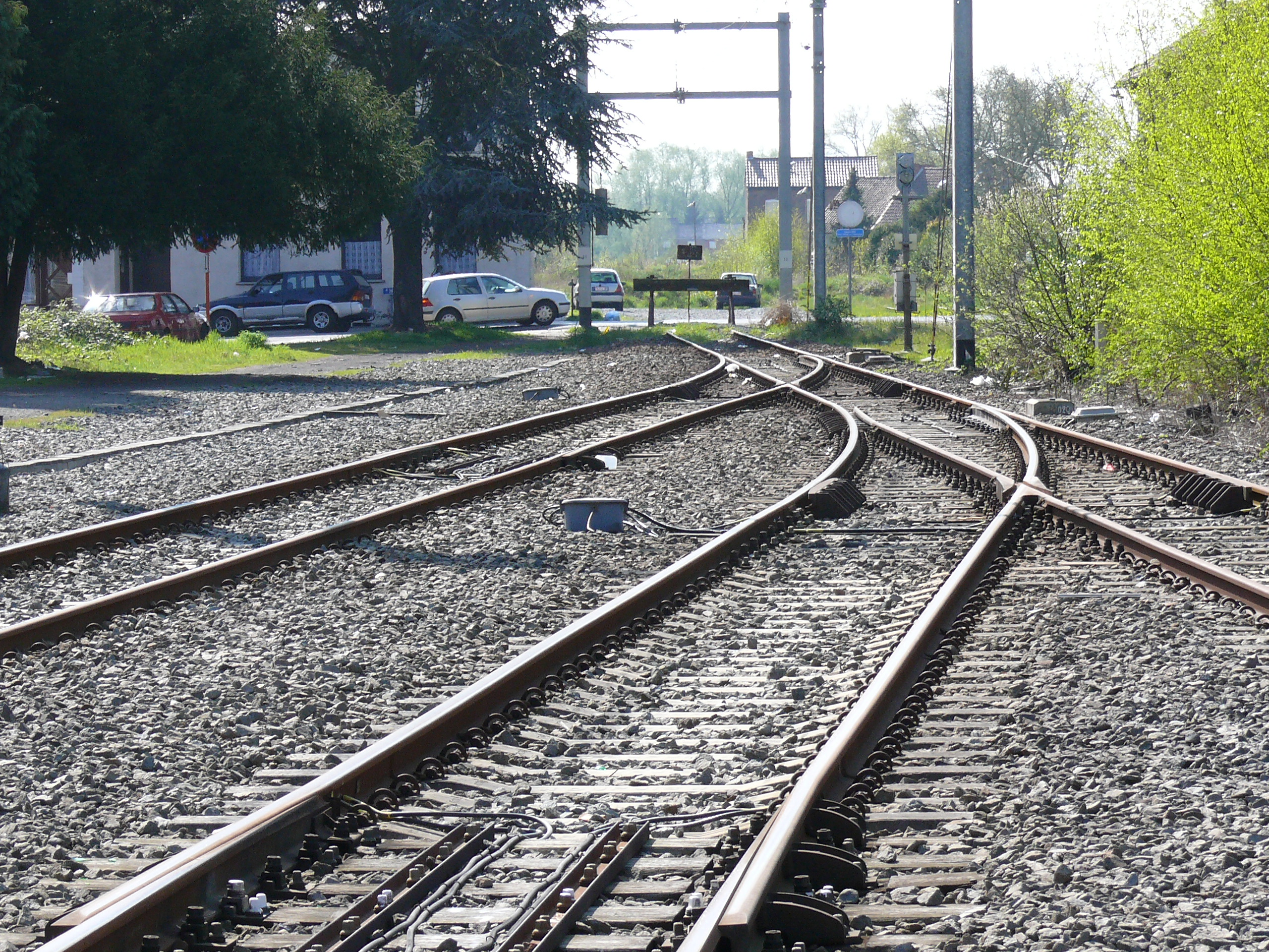 Quiévrain : Le terminus de la Ligne 97 Mons - Quiévrain (Valenciennes) en Gare de Quiévrain La ligne 2 du Tramway de Valenciennes aurait son terminus à la gare de Quiévrain en réutilisant une partie de l'emprise de la ligne 97